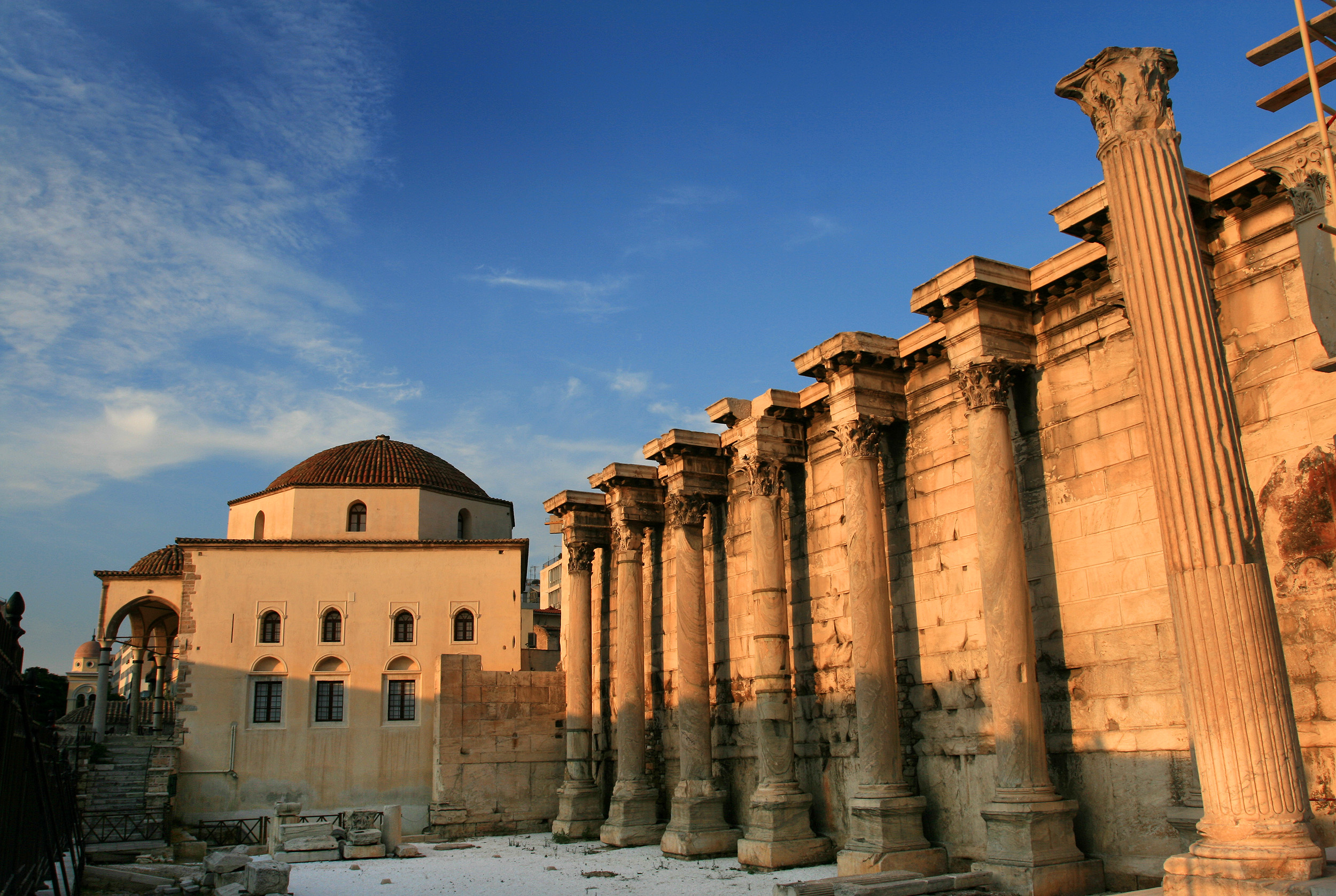 Βιβλιοθήκη Αδριανού«Βιβλιοθήκη Αδριανού»